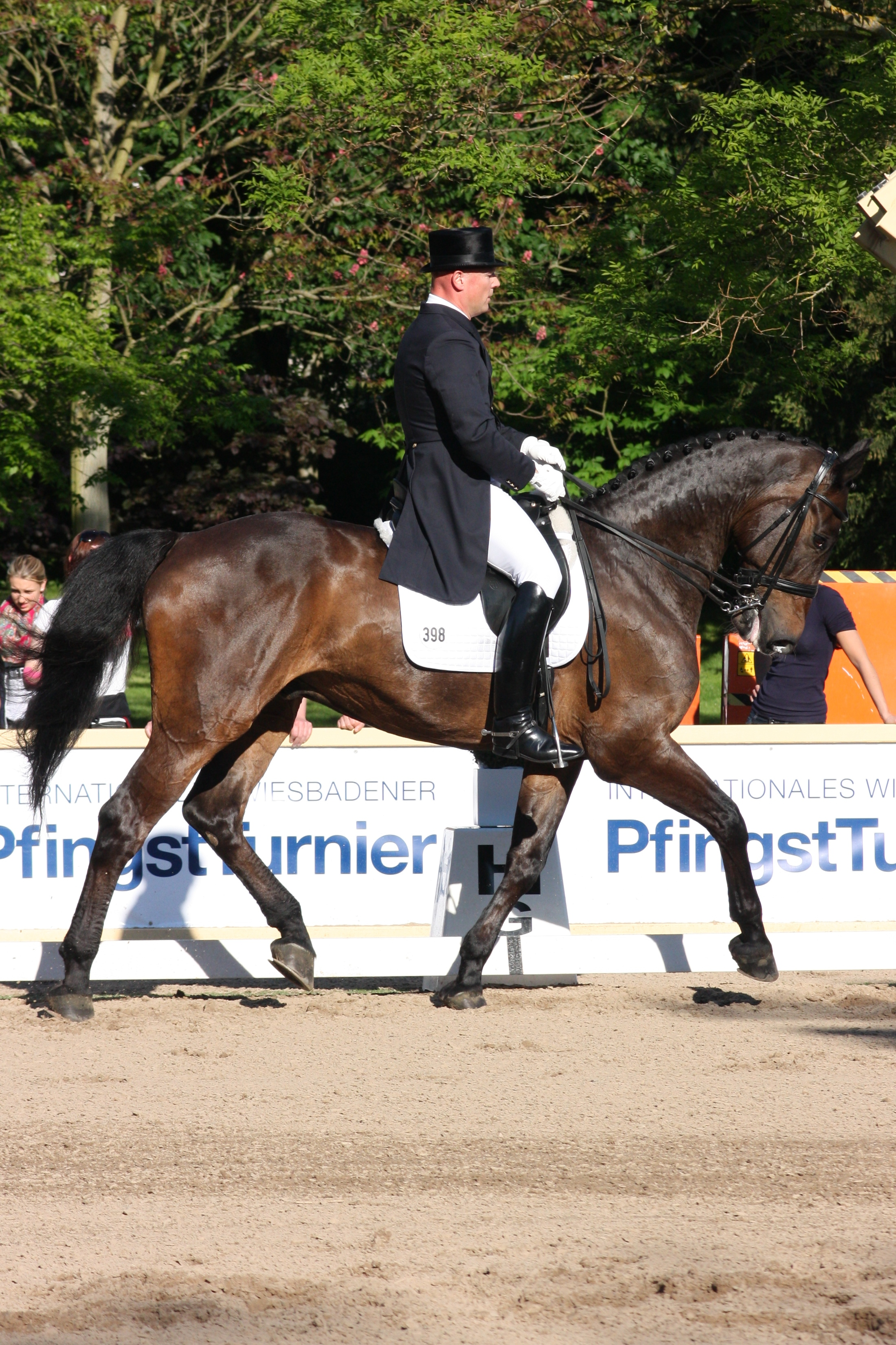 77. Internationales Pfingstturnier Wiesbaden 2013, CDI **** Dressurprüfung Grand Prix de Dressage, Brühe,Christian mit Cinco de Mayo (Amerikanisches Warmblut [1]) Personality rights warning Although this work is freely licensed or in the public domain, the person(s) shown may have rights that legally restrict certain re-uses unless those depicted consent to such uses. In these cases, a model release or other evidence of consent could protect you from infringement claims.